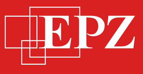 Logo Elektriciteits Produktiemaatschappij Zuid-Nederland.